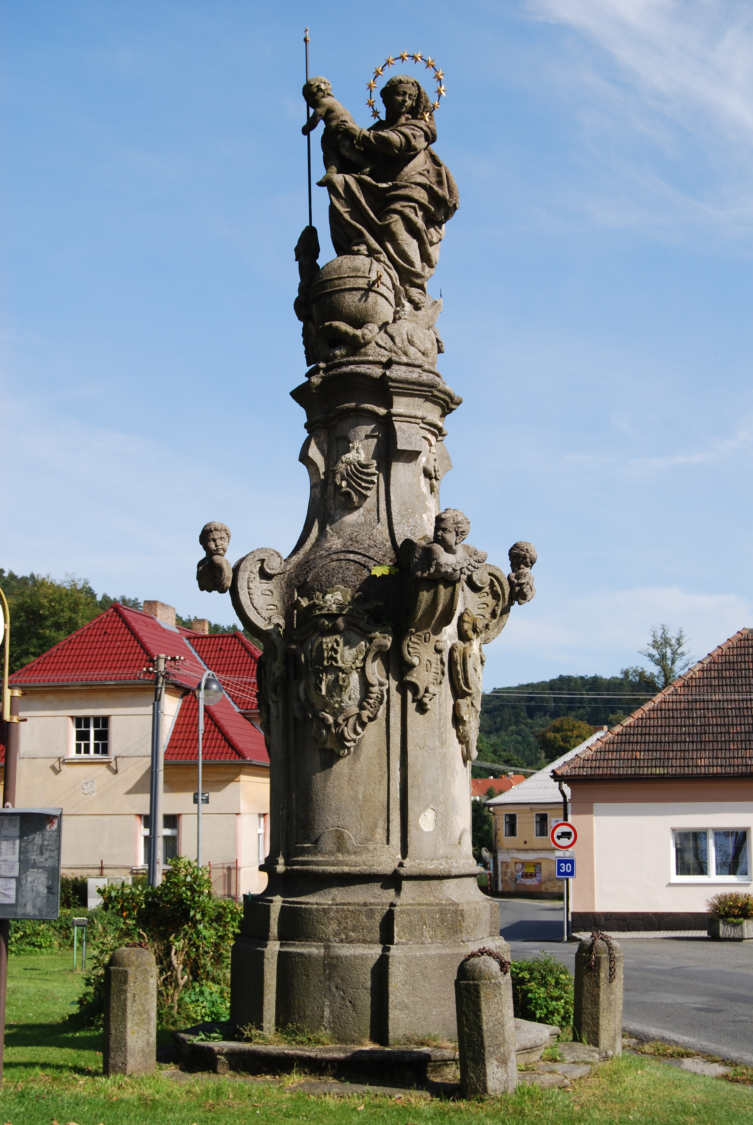 Morový sloup. Žinkovy. Okres Plzeň Jih. Česko.